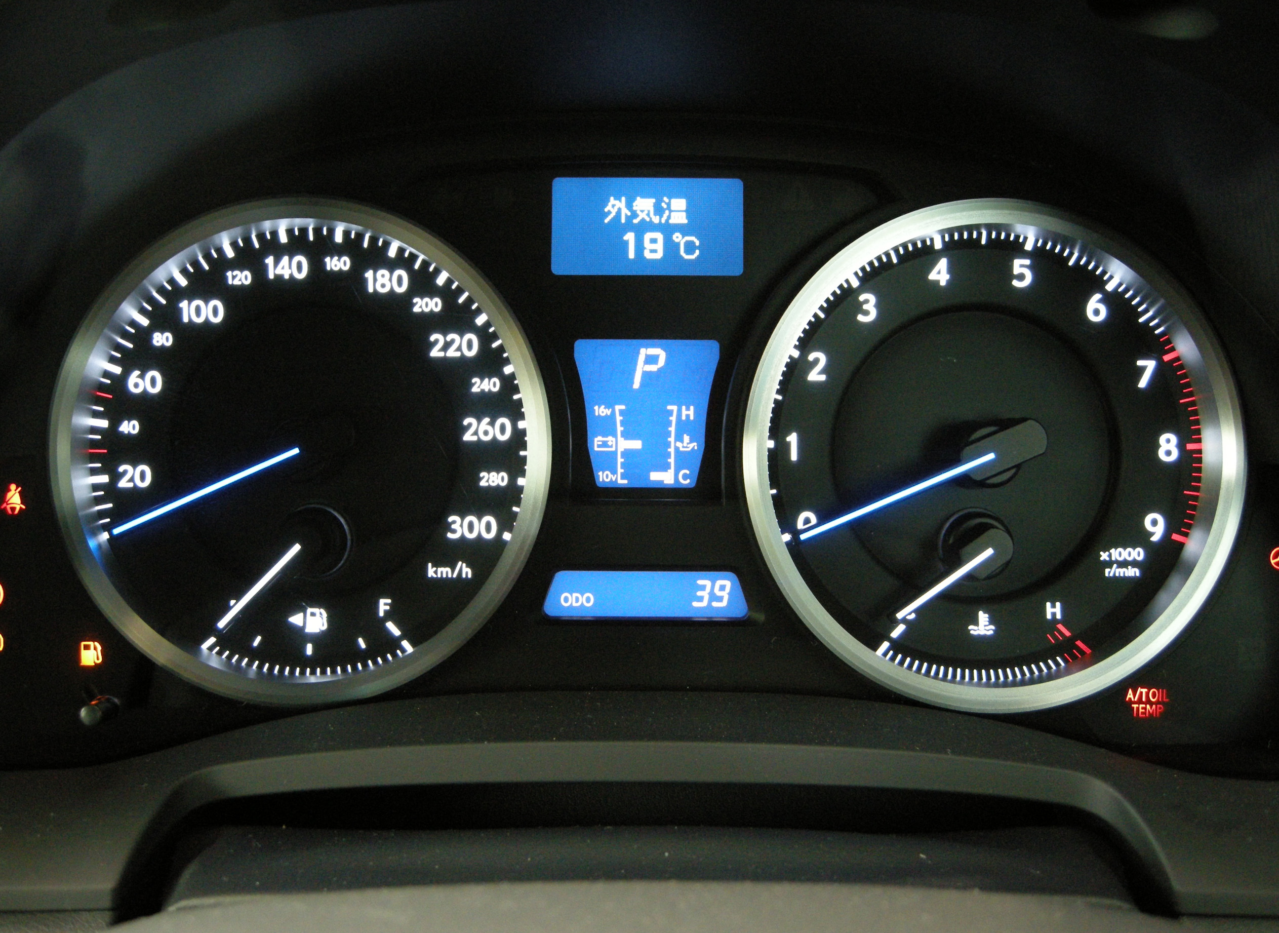 Lexus IS F Dashboard